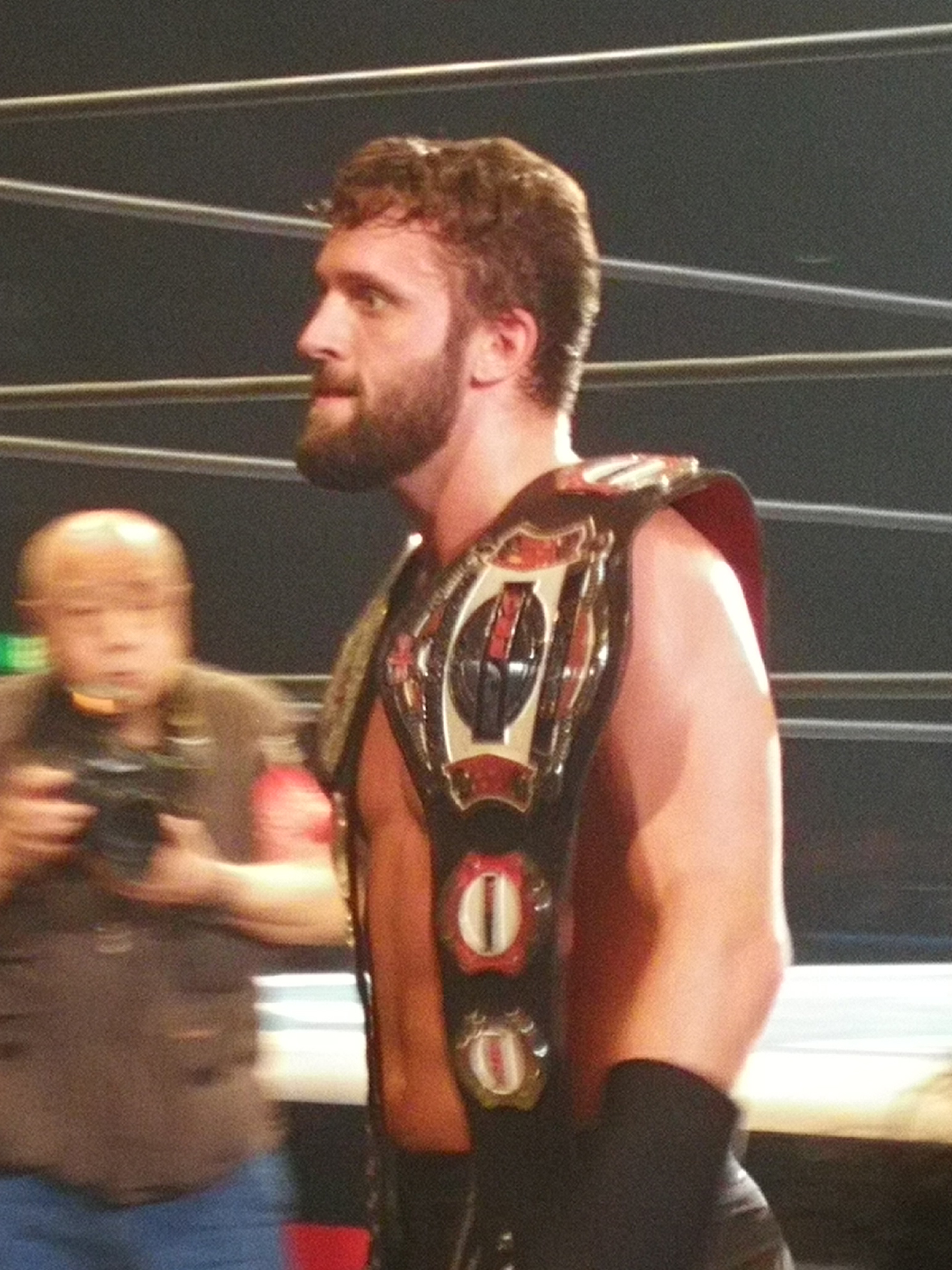 2019年11月3日大阪・大阪府立体育会館（エディオンアリーナ大阪）のエル・ファンタズモ